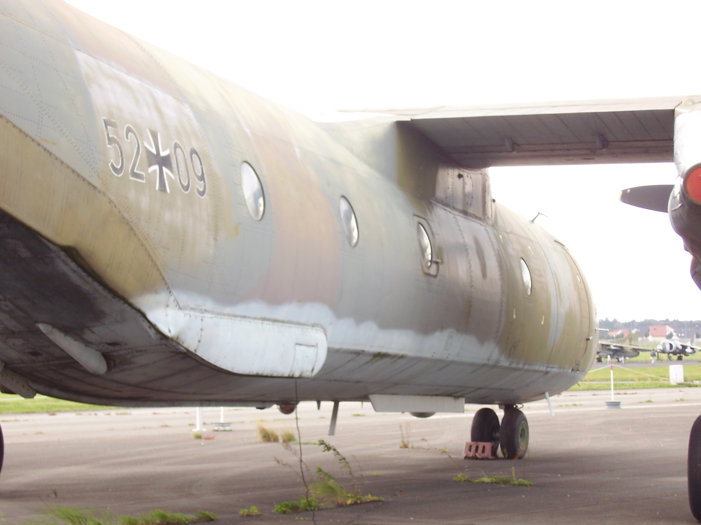 Luftwaffenmuseum der Bundeswehr; Airforce Museum of the Bundeswehr; Berlin-Gatow